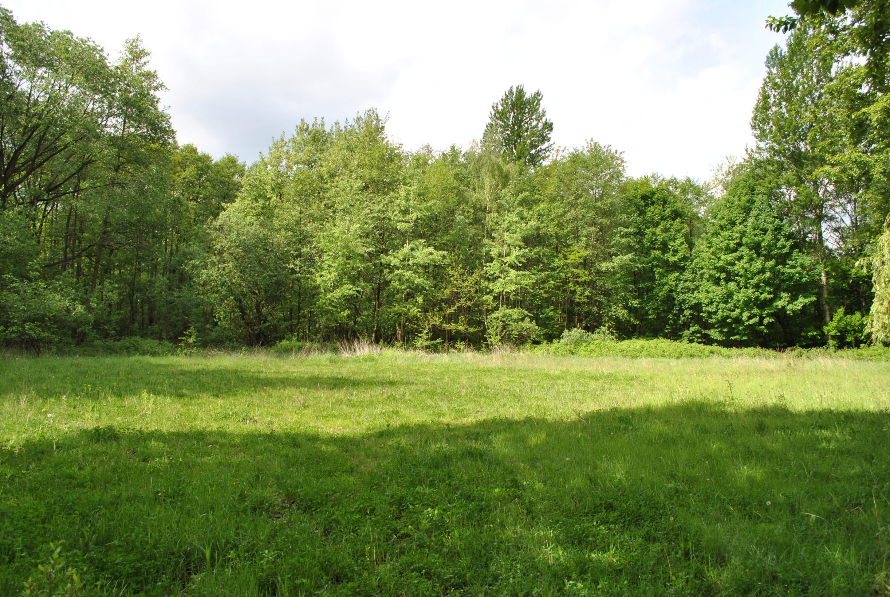 Katowice - Załęska Hałda. Las załęski